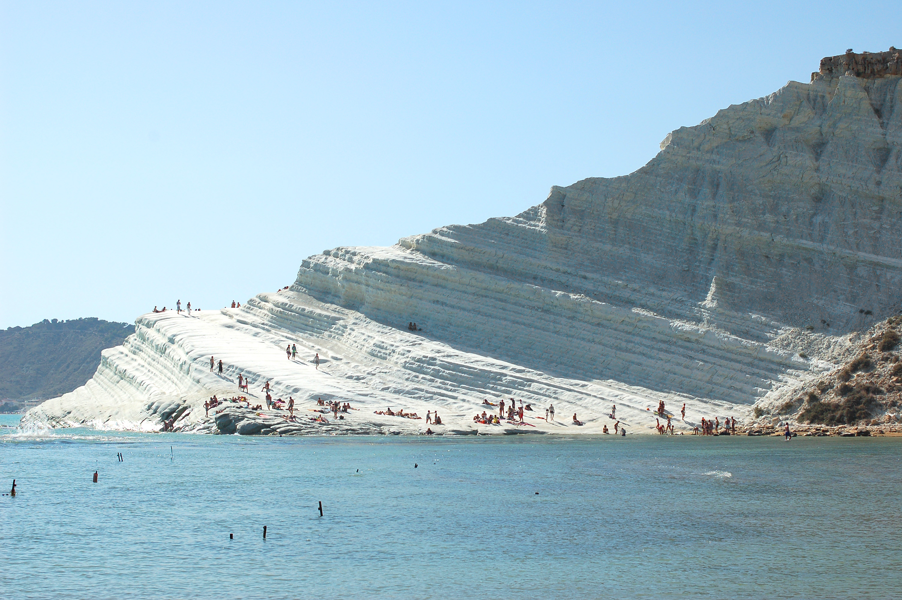 Echelle des Turcs